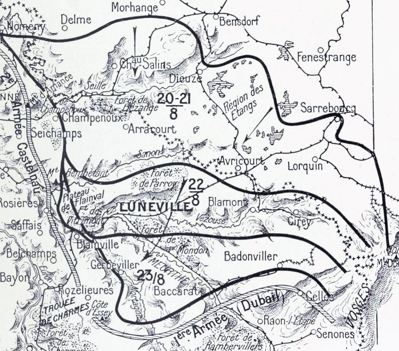 La Bataille du Grand Couronné - Recul du 20 au 23 août 1914 This image comes from Gallica Digital Library and is available under the digital ID bpt6k9691147t/f21.image This tag does not indicate the copyright status of the attached work. A normal copyright tag is still required. See Commons:Licensing.